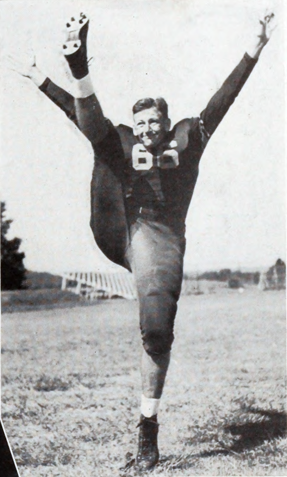 Banks McFadden